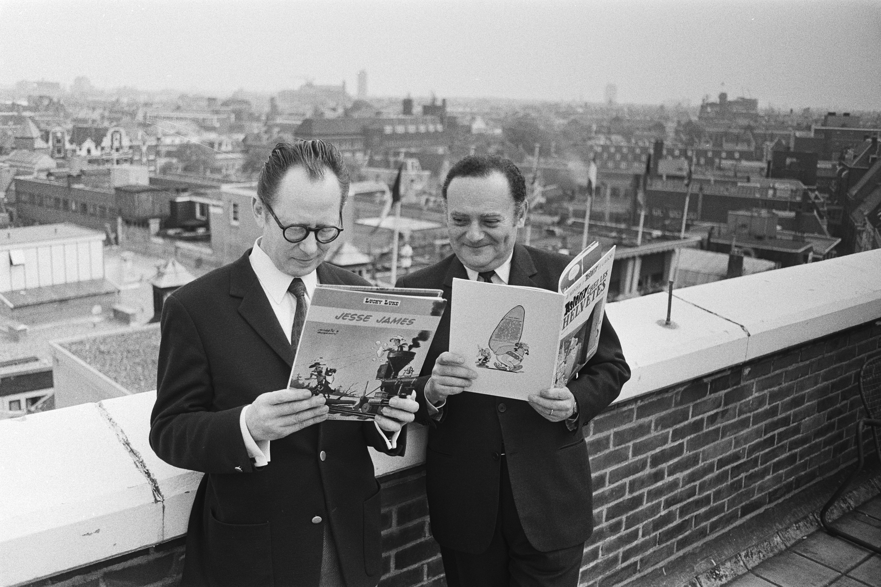 Collectie / Archief : Fotocollectie Anefo Reportage / Serie : Schrijvers van stripverhalen op dakterras Bijenkorf, Amsterdam Beschrijving : Goscinny (scenarist van de strips Asterix en Lucky Luke) (lr en Morris (tekenaar van de strip Lucky Luke (links) Annotatie : Gefografeerd op het dak van warenhuis De Bijenkorf Datum : 27 mei 1971 Locatie : Amsterdam, Noord-Holland Trefwoorden : schrijvers, strips, tekenaars Persoonsnaam : Goscinny, René, Morris (striptekenaar) Fotograaf : Fotograaf Onbekend / Anefo Auteursrechthebbende : Nationaal Archief Materiaalsoort : Negatief (zwart/wit) Nummer archiefinventaris : bekijk toegang 2.24.01.05 Bestanddeelnummer : 924-5893